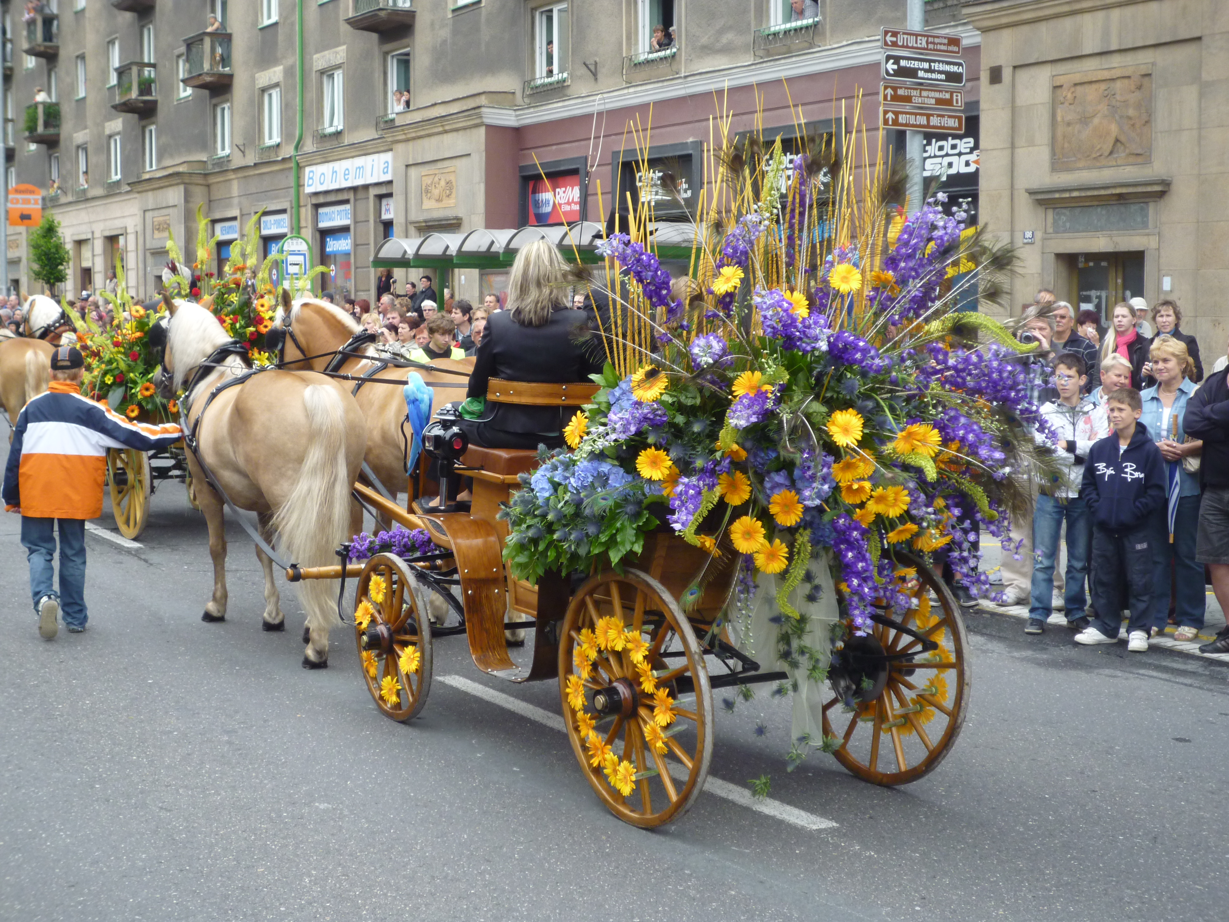 Alegorický koňský kočár na Hlavní třídě (Havířov v květech 2010)